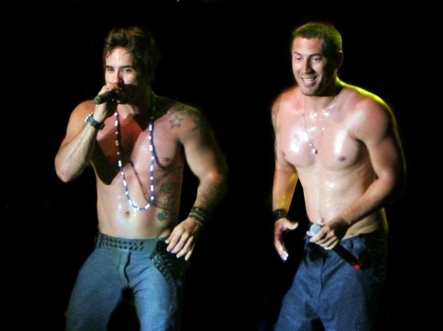 Babado Novo com Guga de Paula e Igor nos vocais em 2010